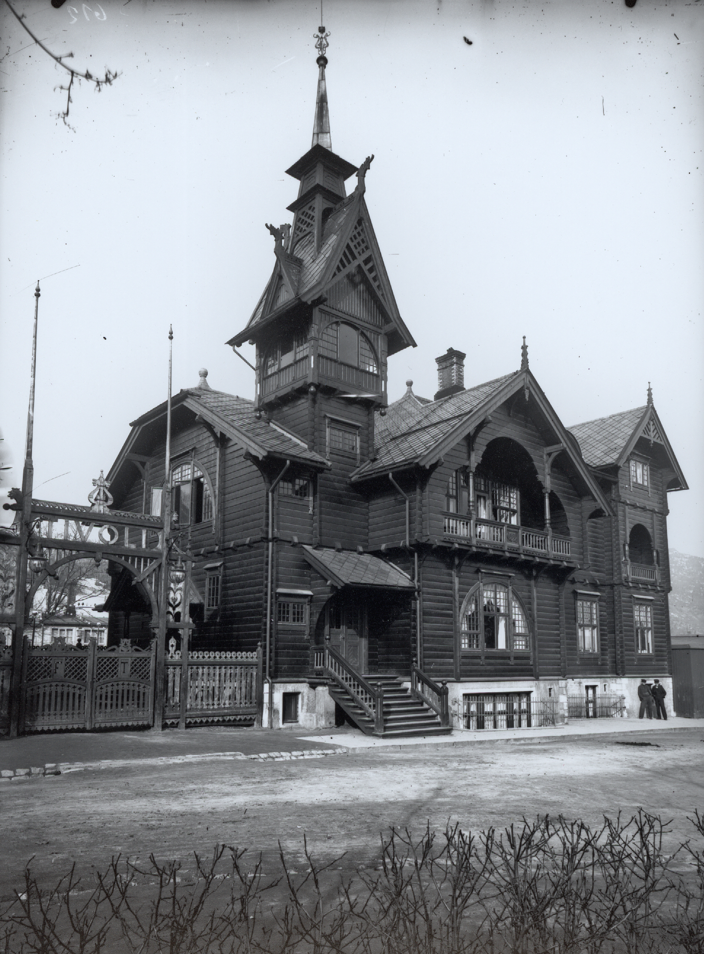 Format: Fotopositiv Dato / Date: etter 1900 Fotograf / Photographer: Erik Olsen Sted / Place: Ilevollen 15, Trondheim Wikipedia: Hjorten Revy- og Varietéteater Wikipedia: Hans Lemvig Christiansen (1826 - 1879) Eier / Owner Institution: Trondheim byarkiv, The Municipal Archives of Trondheim Arkivreferanse / Archive reference: Tor.H45.F9575 (kopi fra Univ. Bibl. I Trondheim. Spesialsamlingene. Billedsamlingen. Nr. 0.612) Merknad: Hjorten fikk navnet sitt i 1867, og var et kjent forlystelsessted. Fritz Topp kjøpte eiendommen i 1898, og da ble spesialbygniningen ombygd til den karakteristiske dragestilen som eldre trondhjemmere husker. Huset ble revet i 1962 for å gi plass til Ilevollen menighetshus og sykehjem.